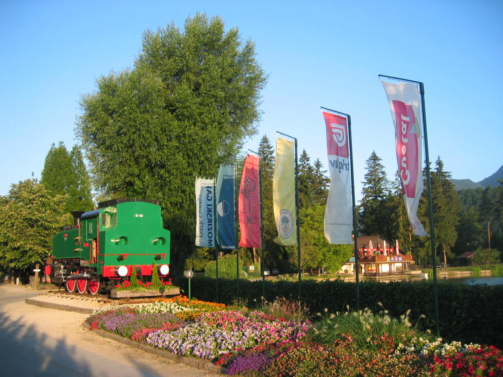 Mozirski gaj, Slovenia photo:Ziga 08:05, 21 October 2006 (UTC)